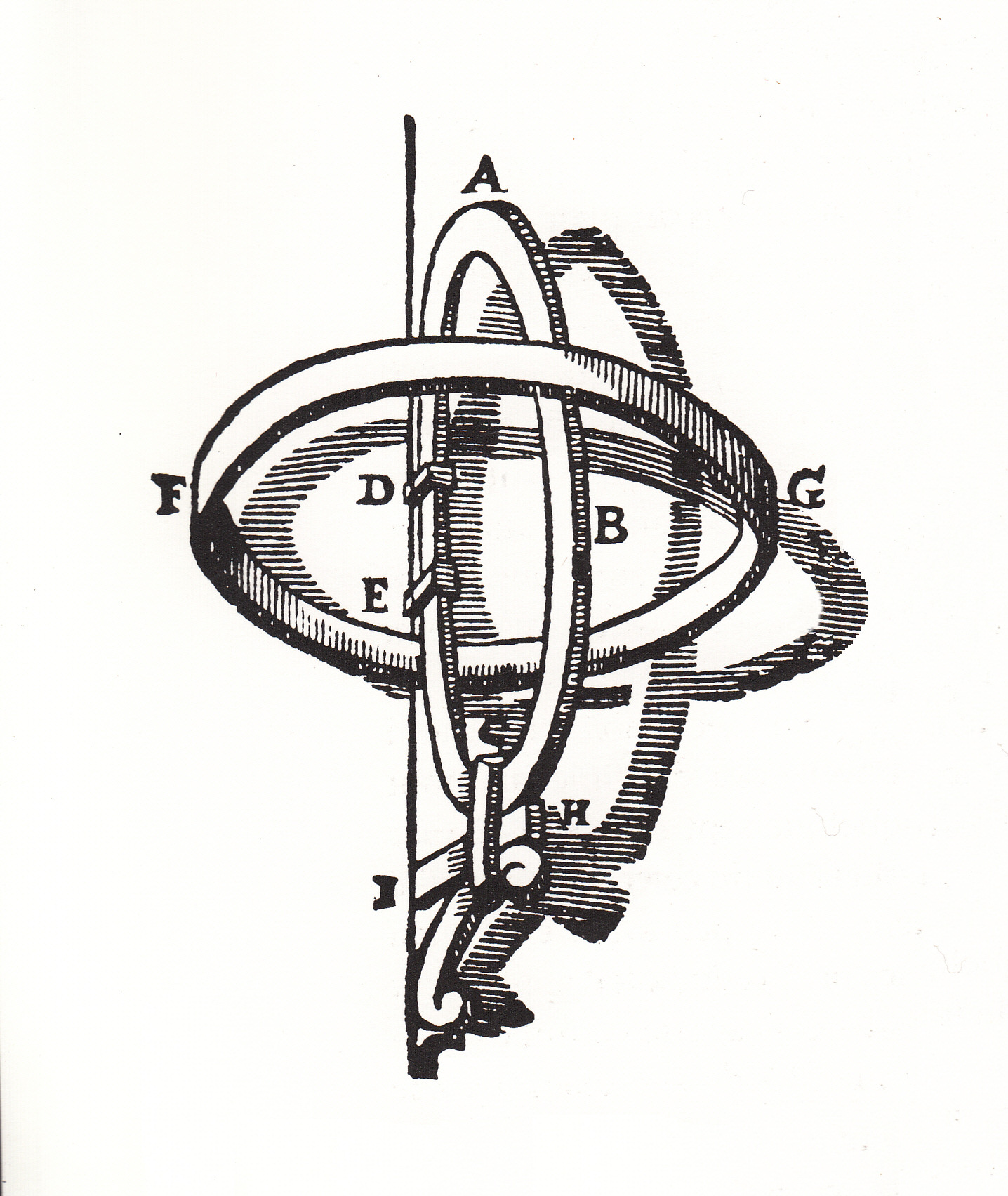 Armilles dites équinoxiales ; une armille équatoriale et une méridienne.